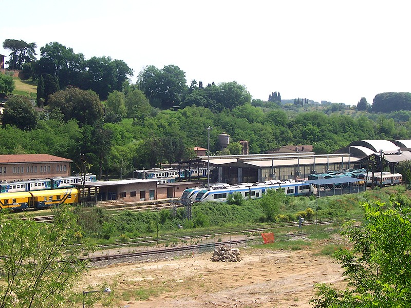 Siena - Deposito Stazione FS